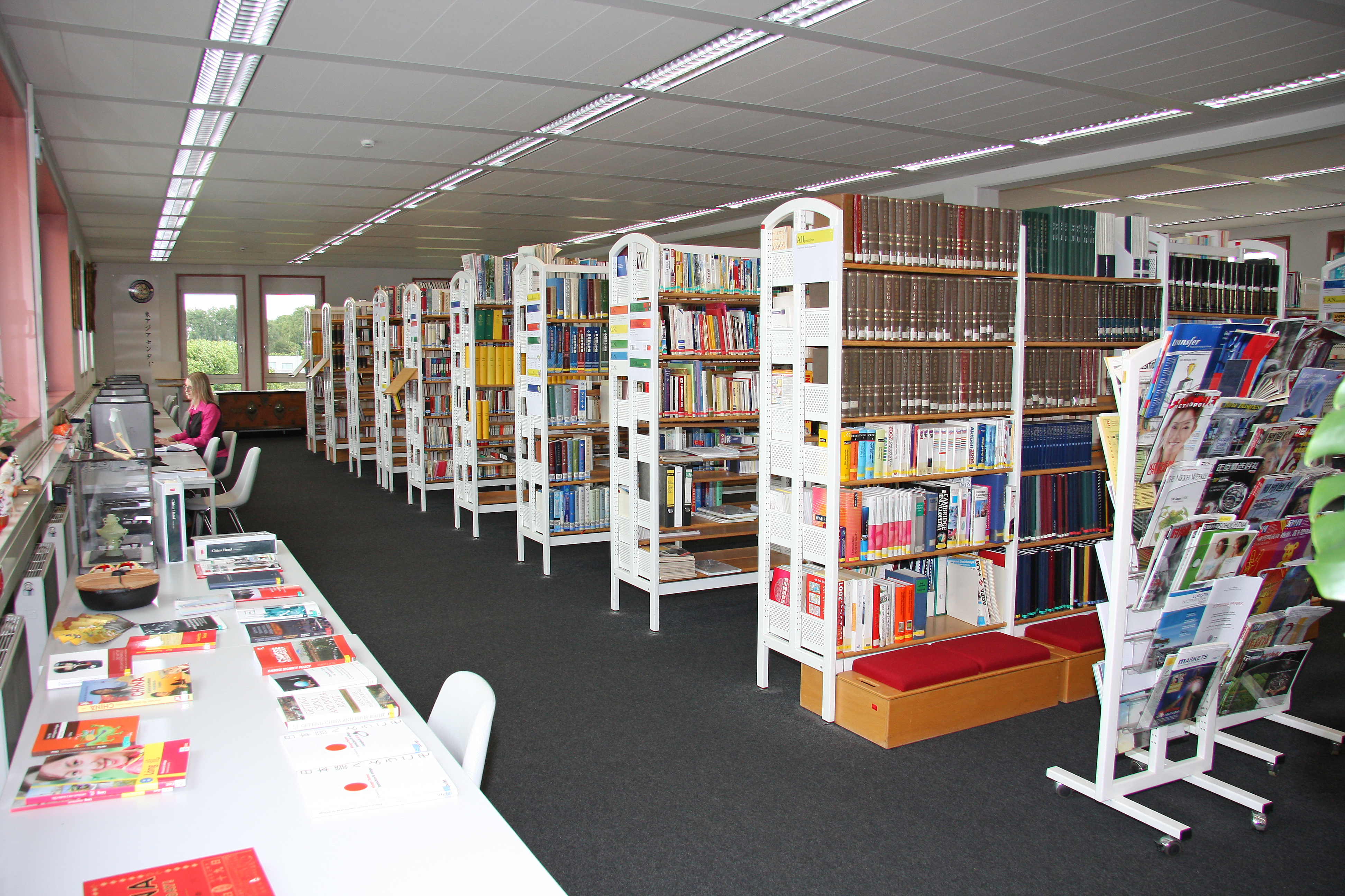 Das Ostasieninstitut ist eine Einrichtung der Hochschule Ludwigshafen mit den Schwerpunkten Wirtschaft Chinas, Wirtschaft Japans oder Wirtschaft Koreas. Es wurde 1989 von dem Sinologen Siegfried Englert unter dem Namen Marketing Ostasien gegründet und 1992 von dem US-amerikanischen Japan-Historiker Peter Wetzler um den Schwerpunkt Japan erweitert. Seit 2016 wird der Schwerpunkt Korea angeboten.